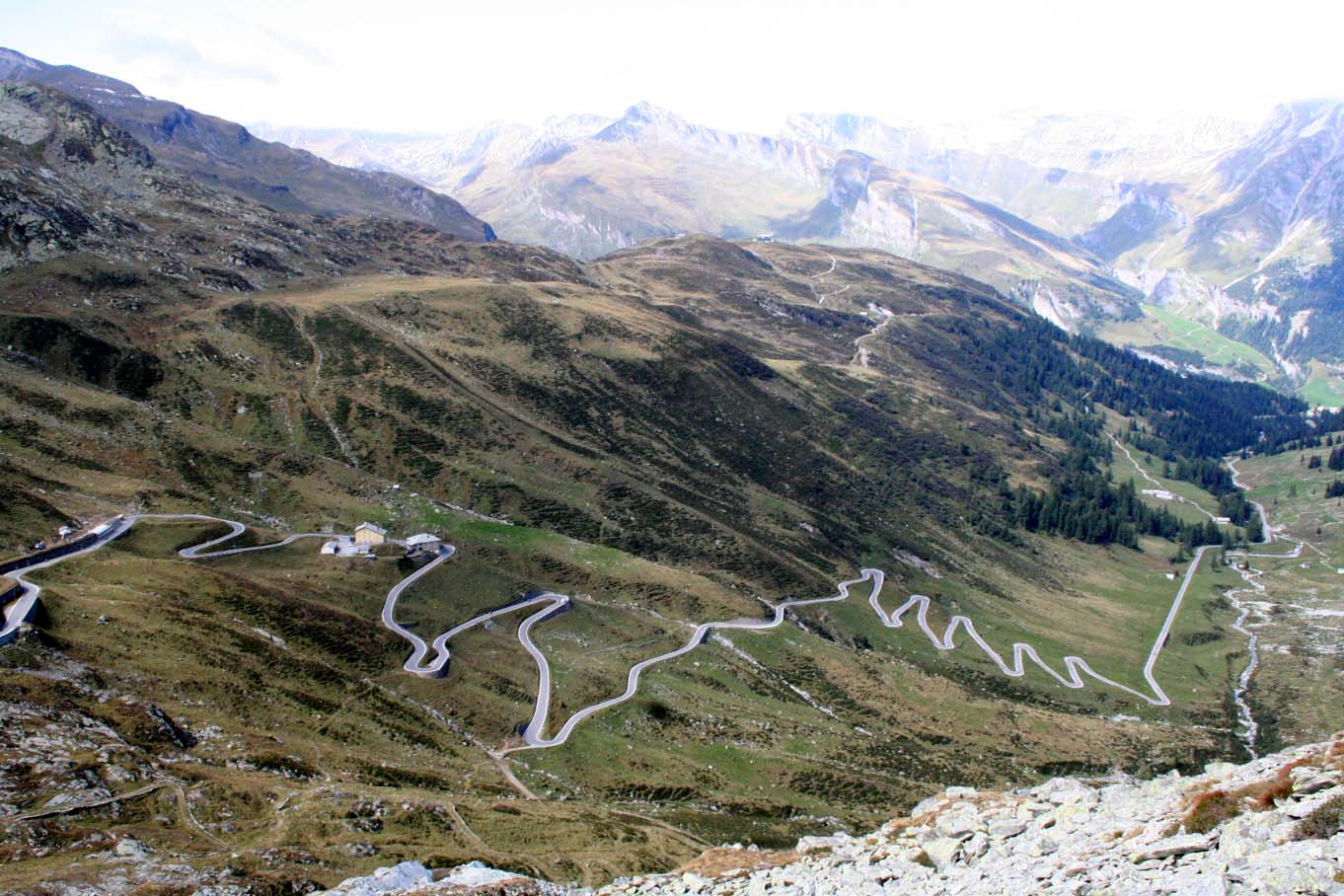 Nordseite